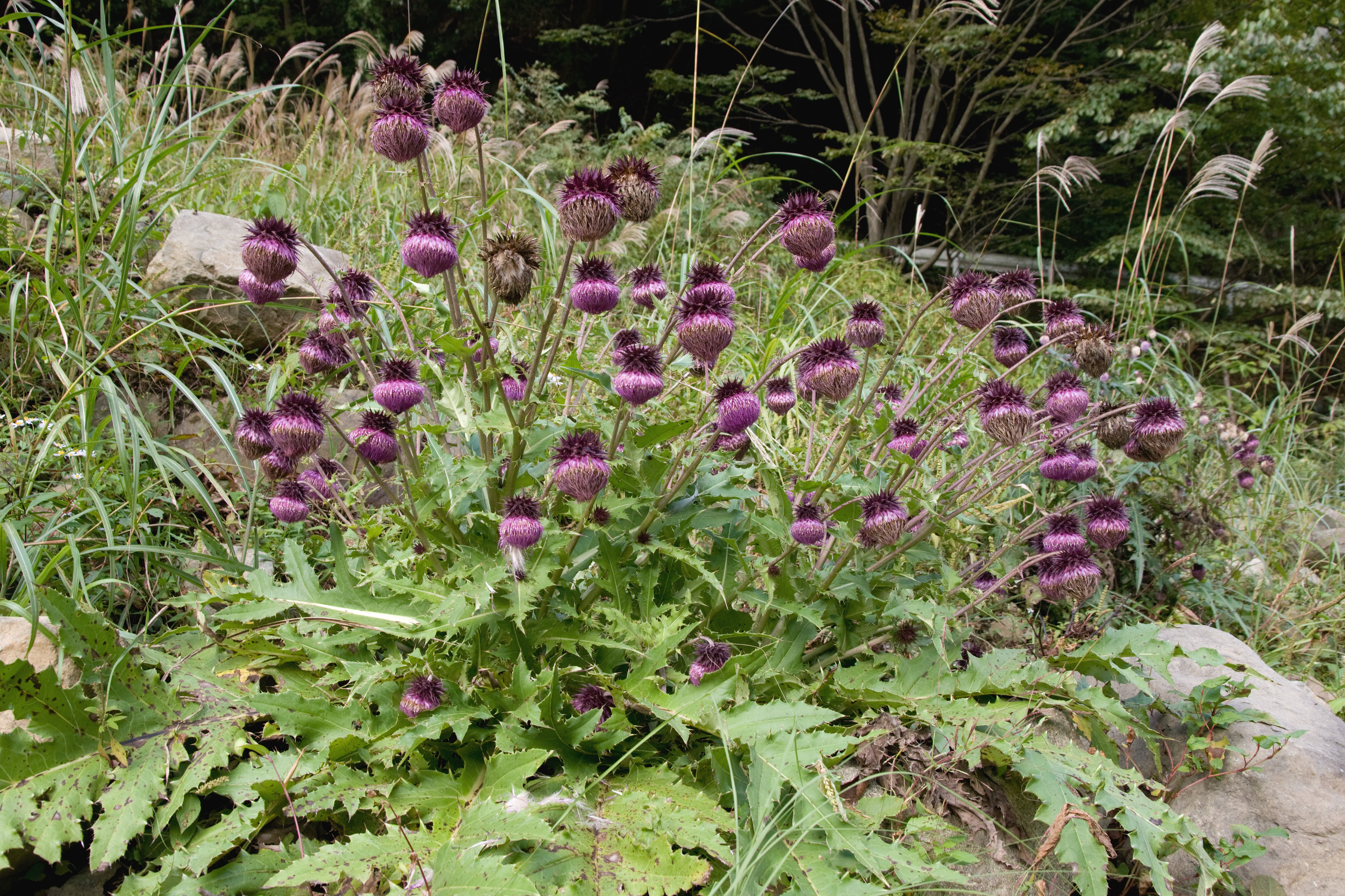 フジアザミ (学名:Cirsium purpuratum)